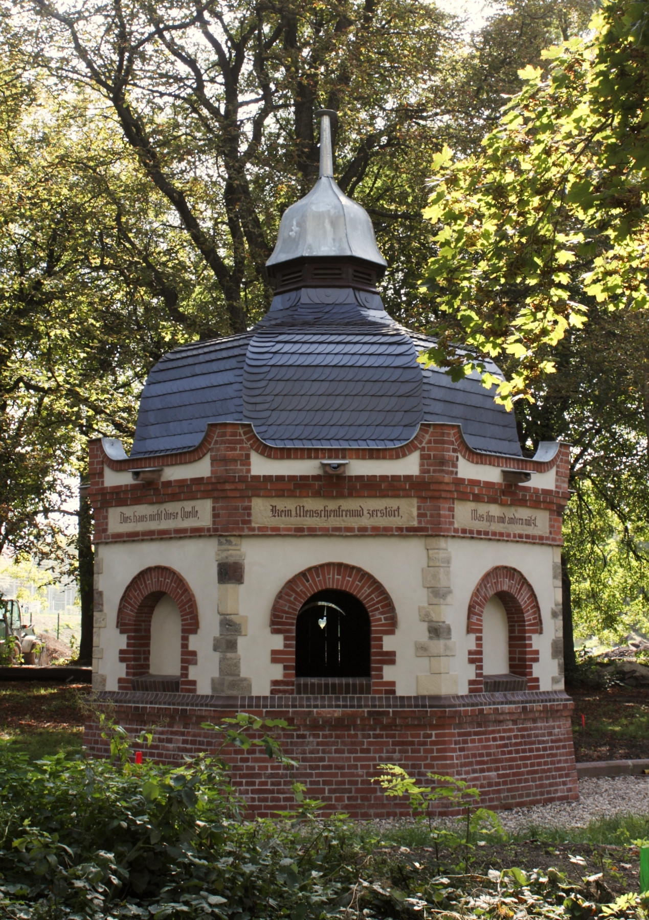 Der Brunnen wurde erstmals im 14. Jhd. erwähnt unter dem Namen "Heiliger Born". Im 17. Jhd. erhielt die Quelle den heutigen Namen "Gesundbrunnen". Anfang des 18. Jhd. wurde der Brunnen mit einem achteckigen Häuschen überbaut. Das heute existierende Brunnenhaus wurde auf dessen Grundmauern 1901 errichtet. 2008 gründete sich der Bürgerverein "Brunnenhaus - Gesundbrunnen Halle e.V." und engagiert sich seither für die denkmalgerechte Sanierung des während der DDR-Zeiten völlig verfallenen Brunnenhauses. Eine Treppe führt zum Quellenausgang. Das Quellwasser ist sehr eisenhaltig. Nach dem "Gesundbrunnen" ist im Süden von Halle ein Stadtteil benannt. Standort: 51° 27´58,14´´ N 11° 57´31,22´´O Max-Lademann-Straße, Ecke Kantstraße 06128 Halle / Saale